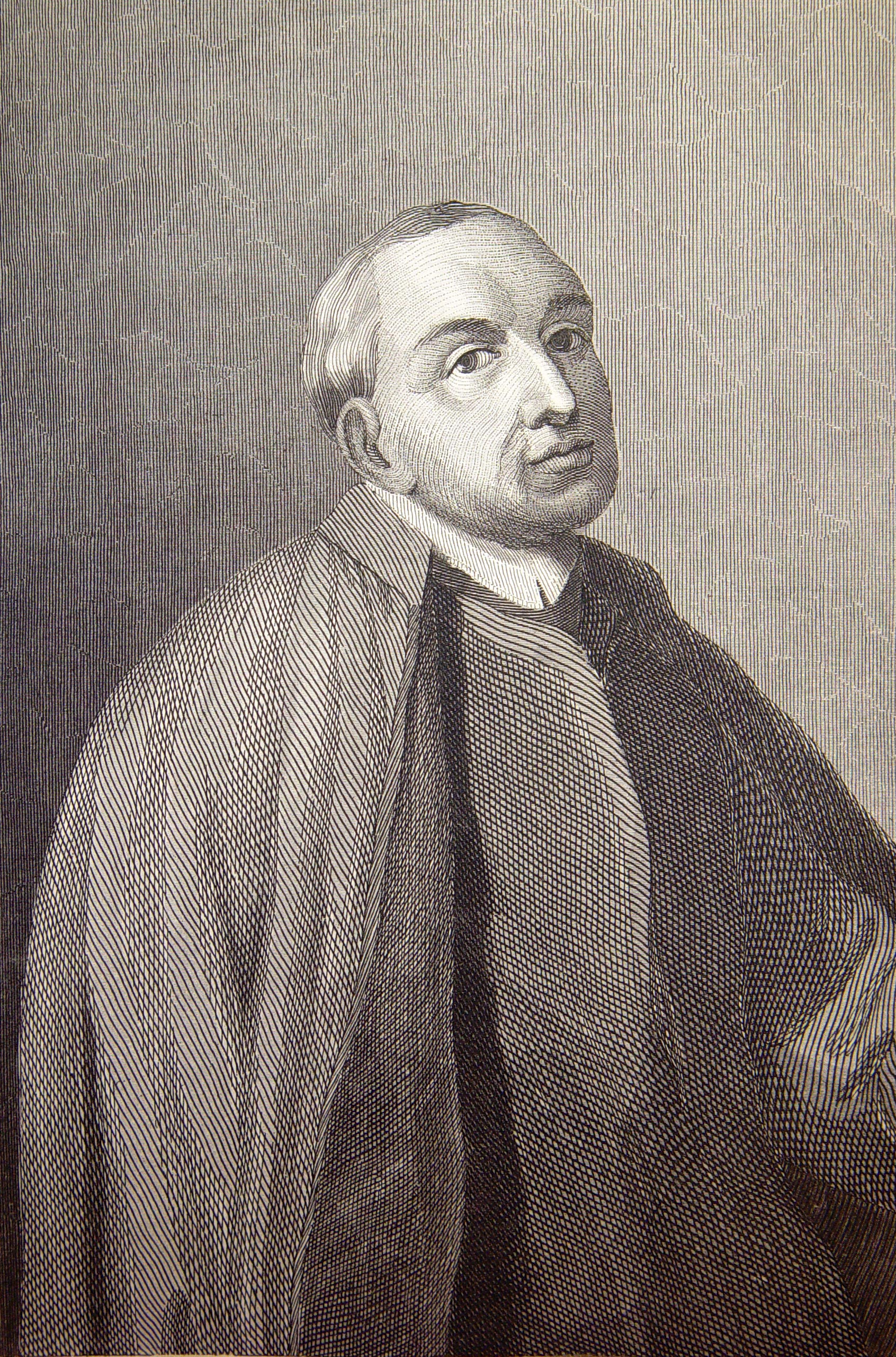 Grabado en blanco y negro decimonónico que representa al historiador, arqueólogo y humanista cordobés Ambrosio de Morales (1513-1591), en el claustro de la iglesia de San Hipólito de Córdoba, provincia de Córdoba, (España). Ilustraciones pertenecientes al libro: Las glorias nacionales : grande historia universal de todos los reinos, provincias, islas y colonias de la Monarquía Española, desde los tiempos primitivos hasta el año de 1852. - Madrid [etc.] (Barcelona : Imprenta de Luis Tasso) Librería de la Publicidad [etc.], 1852-1854.